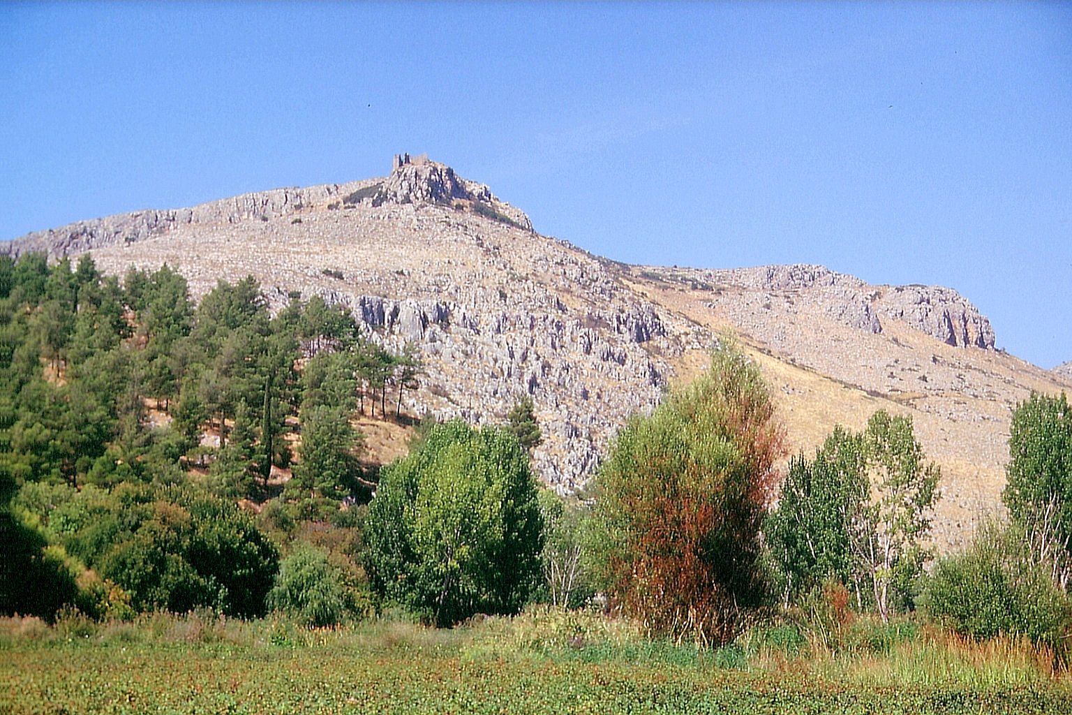 Akropolis von Orchomenos auf dem Berg Akontion, aus ONO